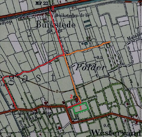 Uitsnede van een topografische kaart uit 1932 van het Kadaster met daarop de buurt Buikstede, zoals deze erbij lag voor de aanleg van het Van Starkenborghkanaal in 1934. Het grootste deel van de huisjes aan het Hoendiep (voorloper van het Van Starkenborghkanaal) is toen gesloopt evenals de draaibrug (3 op de kaart). Ten zuiden van het buurtje loopt nu een fietspad dat rood is ingekleurd. Dit fietspad loopt over het noordelijke deel van de vroegere laan van de borg Boekstede (borgterrein is 1 op de kaart), langs de boerderij Buikstede (2). De oranje gekleurde delen zijn de stukken weg die later zijn verwijderd.